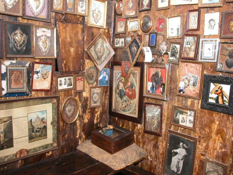 Interno della casa museo della Venerabile Mariangela Virgili